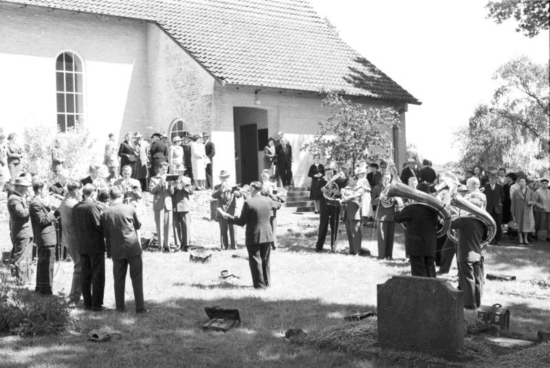 Autobahnkirche Exter vor dreißig Jahren eingeweiht